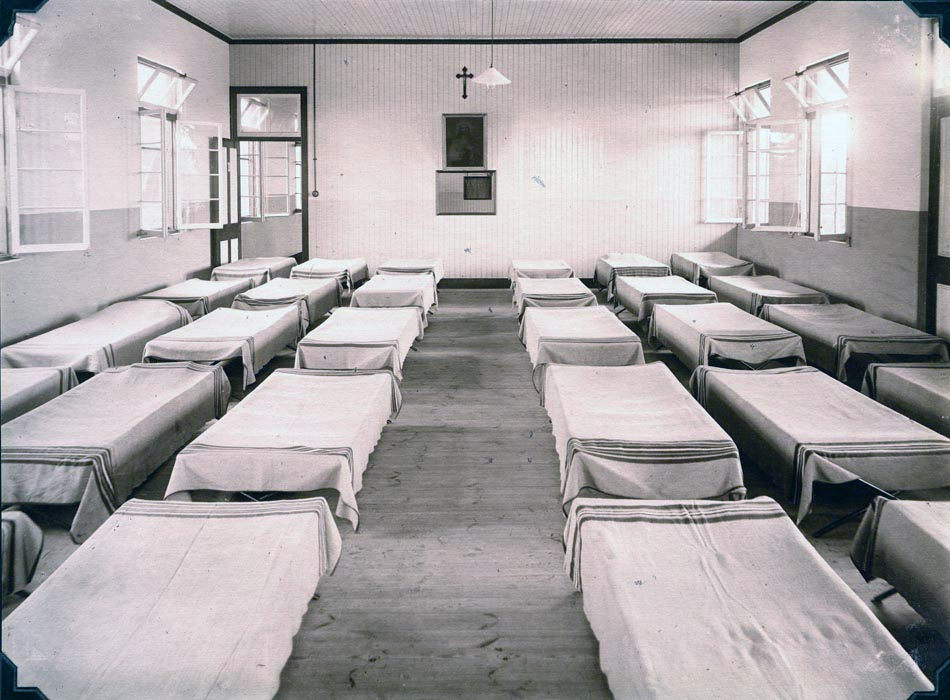 Dormitório dos internados da Escola Oliveira Martins